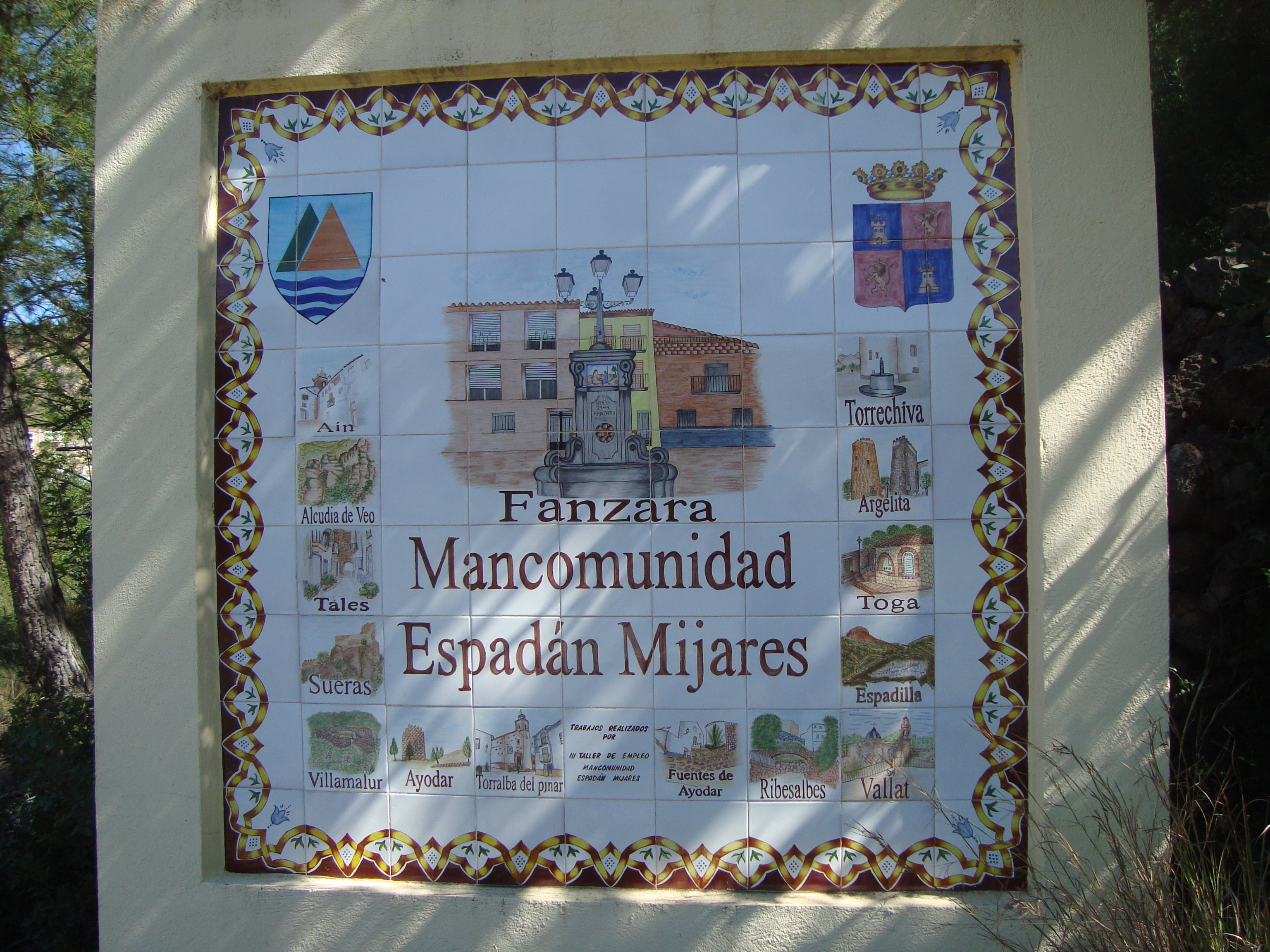 Fanzara, mural cerámic, Mancomunidad Espadà-Millars (Castelló)